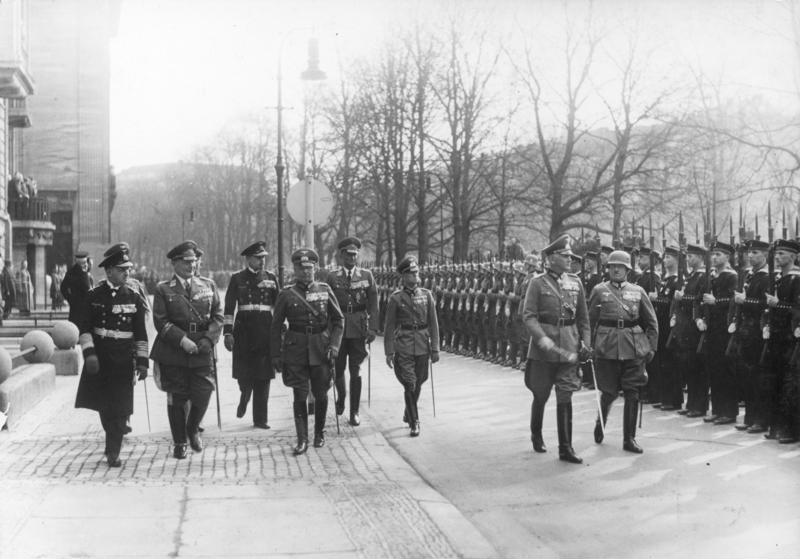 Scherl: Parade zu Ehren Blombergs Der Reichskriegsminister Generalfeldmarschall von Blomberg beging am Sonnabend [11.3.1937] die Feier seines 40jährigen Militärjubiläums. Die drei Wehrmachtsteile - Heer, Marine und Luftwaffe - ehrten den Jubilar durch eine Parade vor dem Reichskriegsministerium. Generalfeldmarschall von Blomberg beim Abschreiten der Front der Ehrenkompanien; rechts neben ihm Oberst von Alten, der Kommandeur der Wachtruppe Berlin, links die Oberbefehlshaber der drei Wehrmachtsteile, Generaladmiral Raeder, Generaloberst Göring und Generaloberst Freiherr von Fritsch. 13.3.1937 [Herausgabedatum]